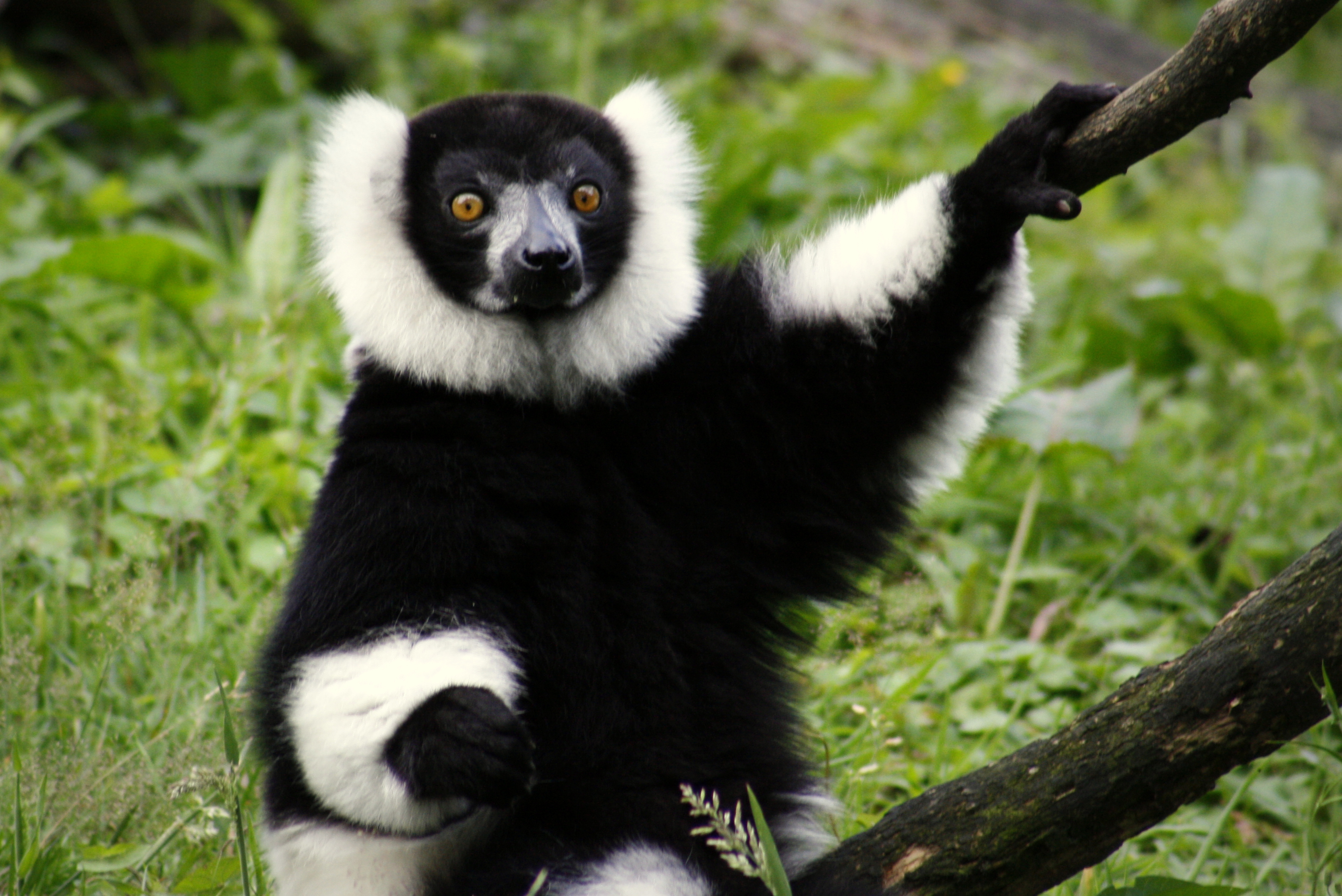 zwart-witte vari, foto genomen in Apenheul, Apeldoorn, Nederland